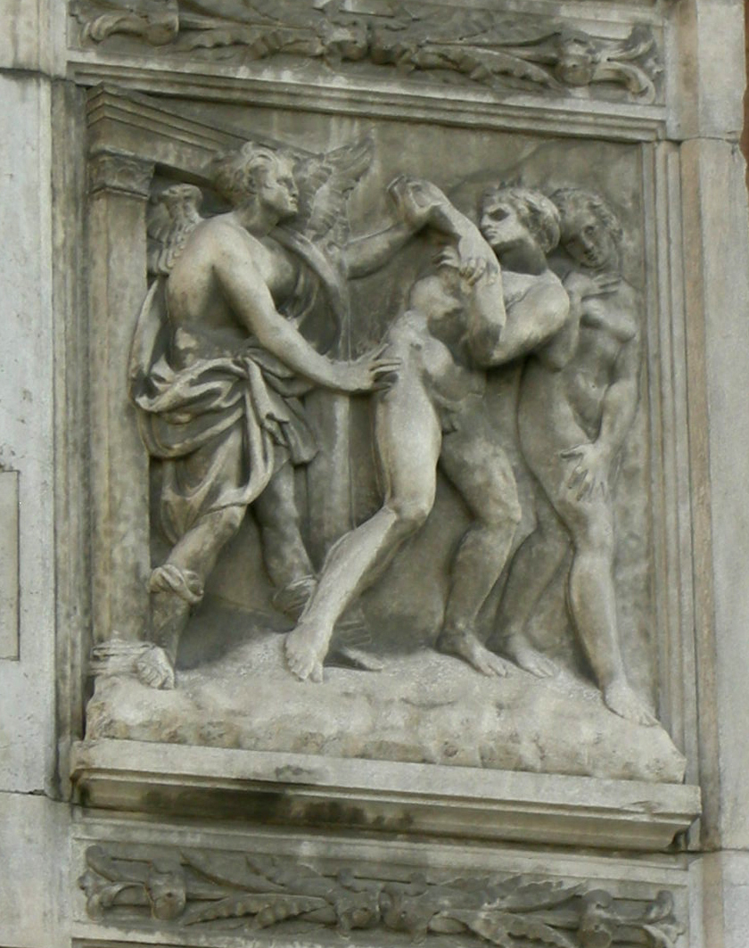 Jacopo della quercia, 04. cacciata dal paradiso terrestre